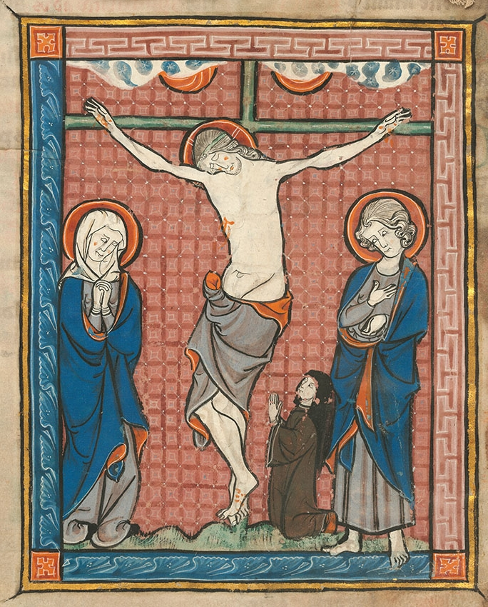 Manuscrit issu de l'abbaye cistercienne de Marquette-lès-Lille.